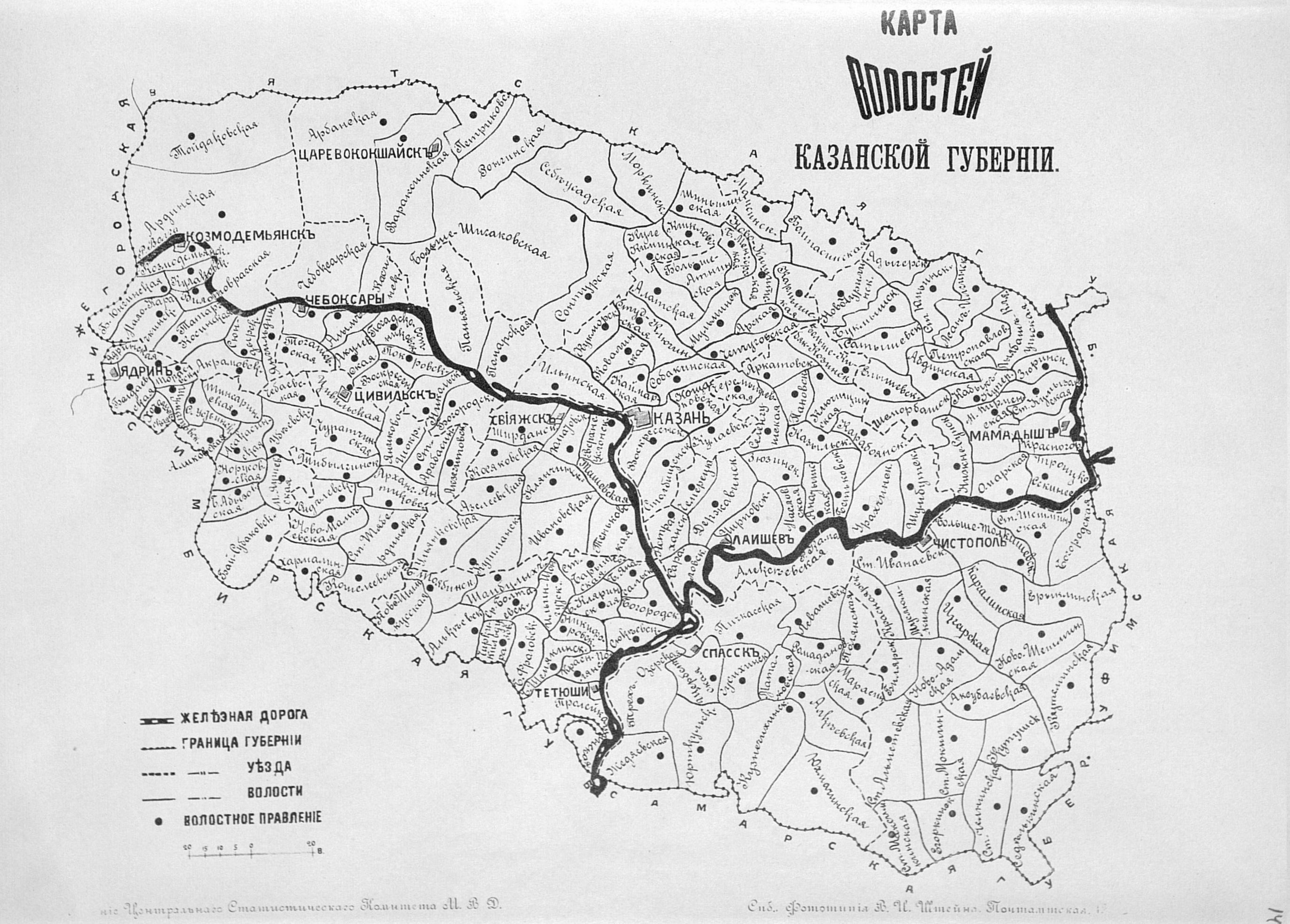 Карта волостей Казанской губернии